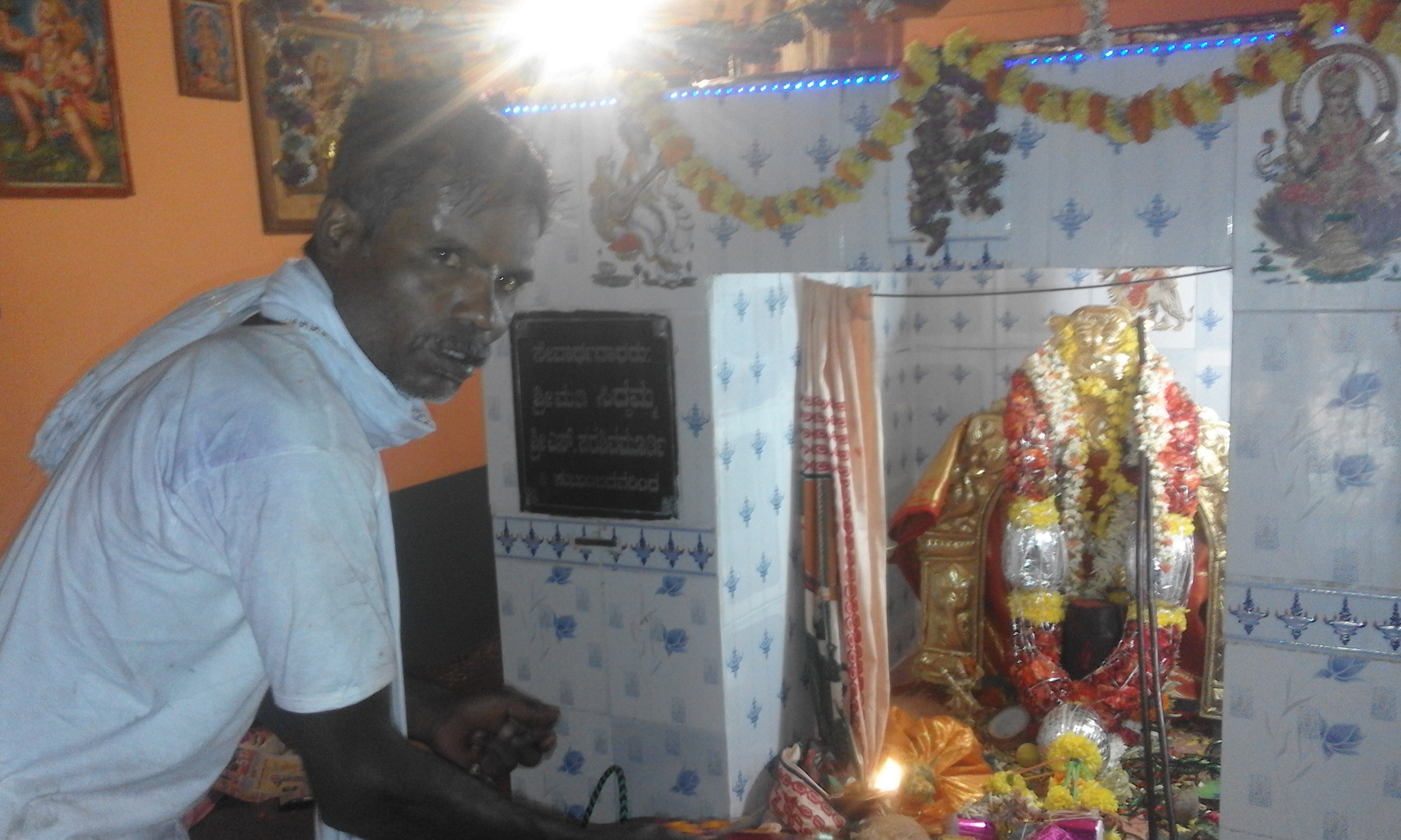 kannayakanahalli maaramma temple